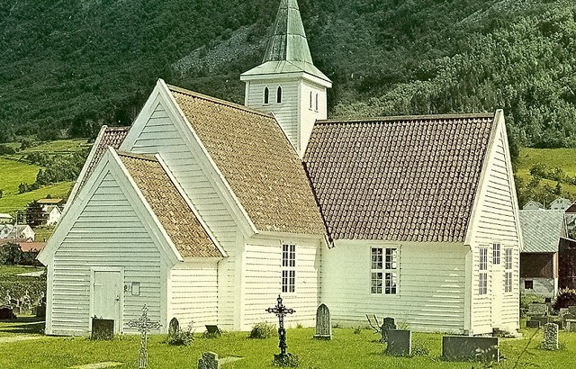 Olden gamle kirke